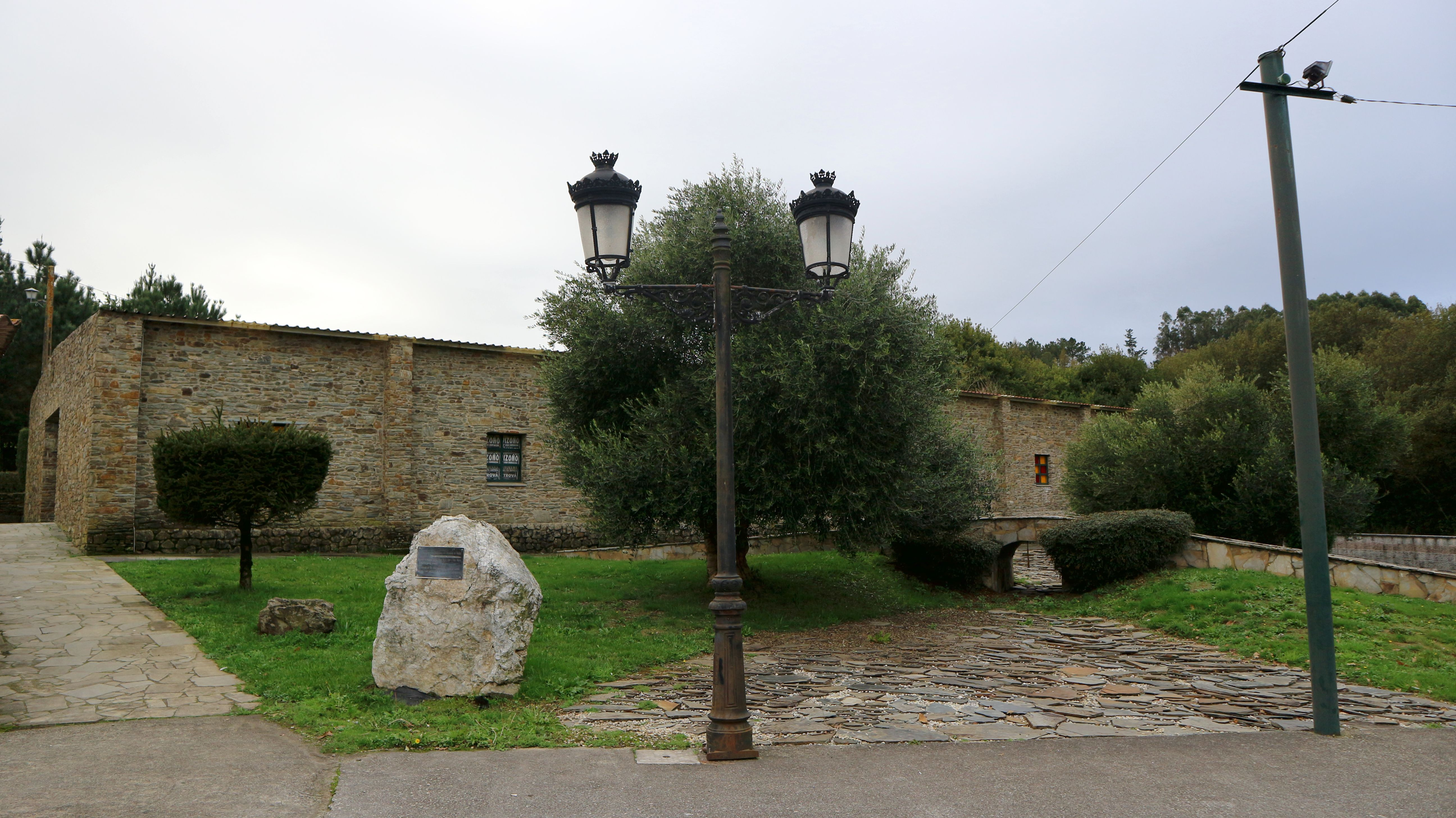 Novo adro da Igrexa de San Pedro de Vizoño. En Vizoño, Abegondo.